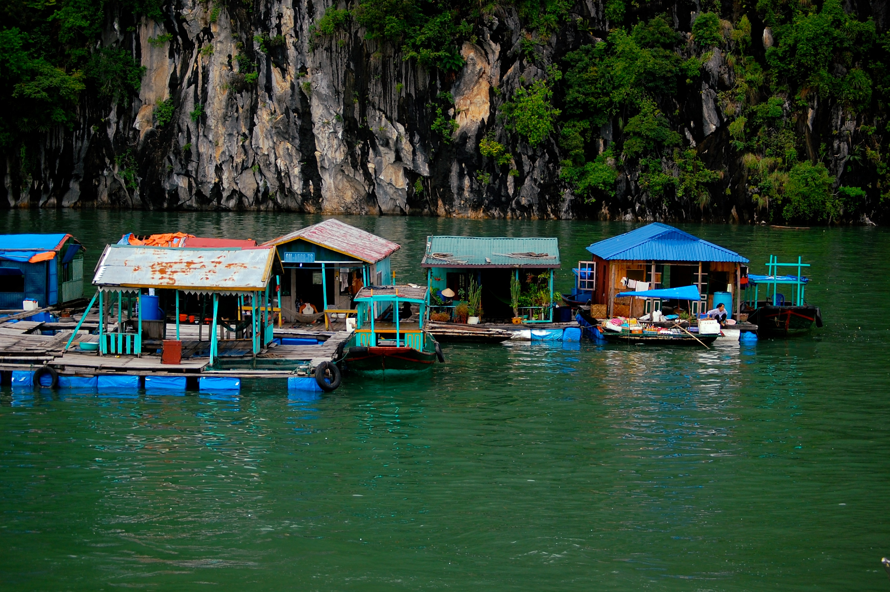 Ha Long Bay